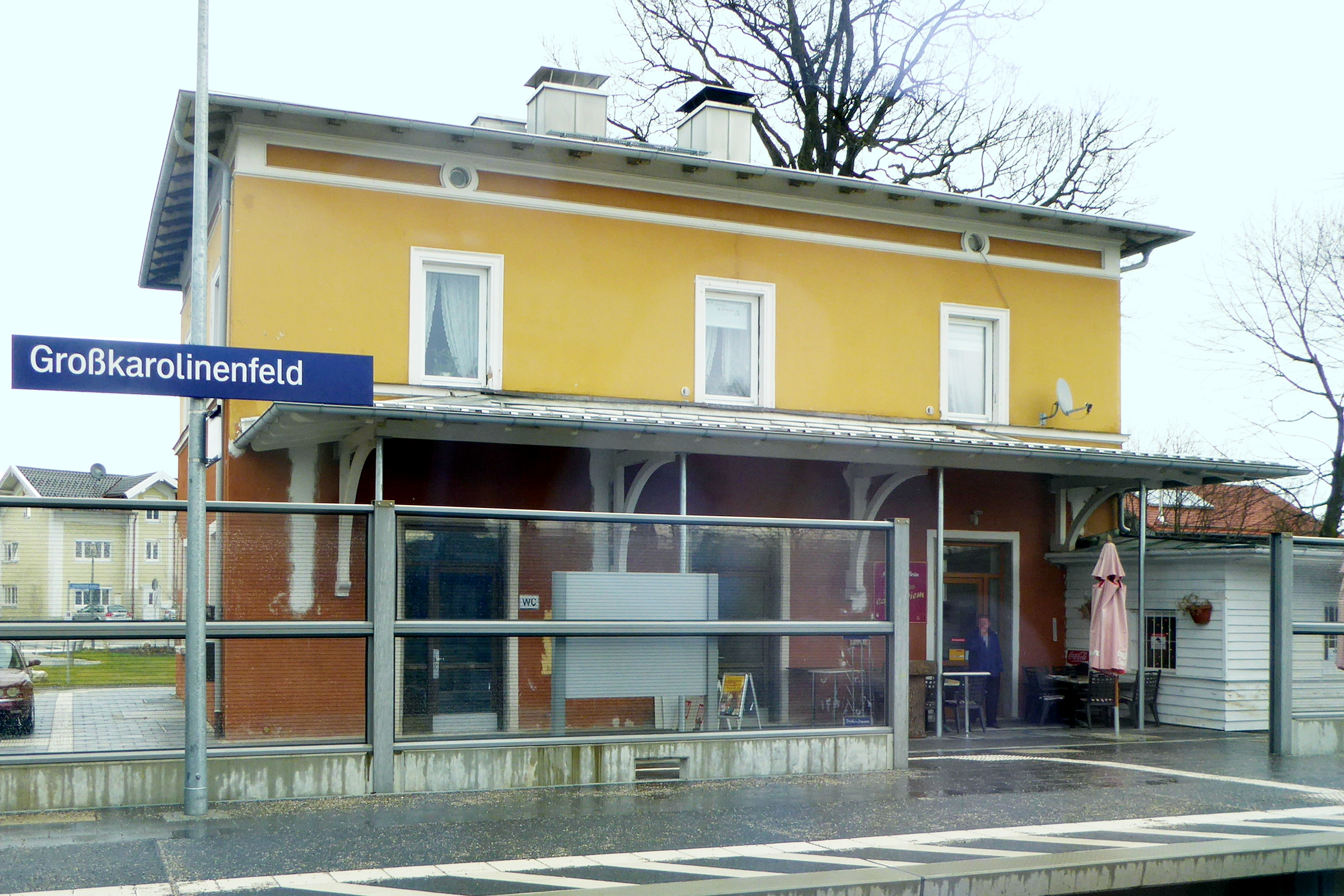 Bahnhofsgebäude von Großkarolinenfeld, Gleisseite.